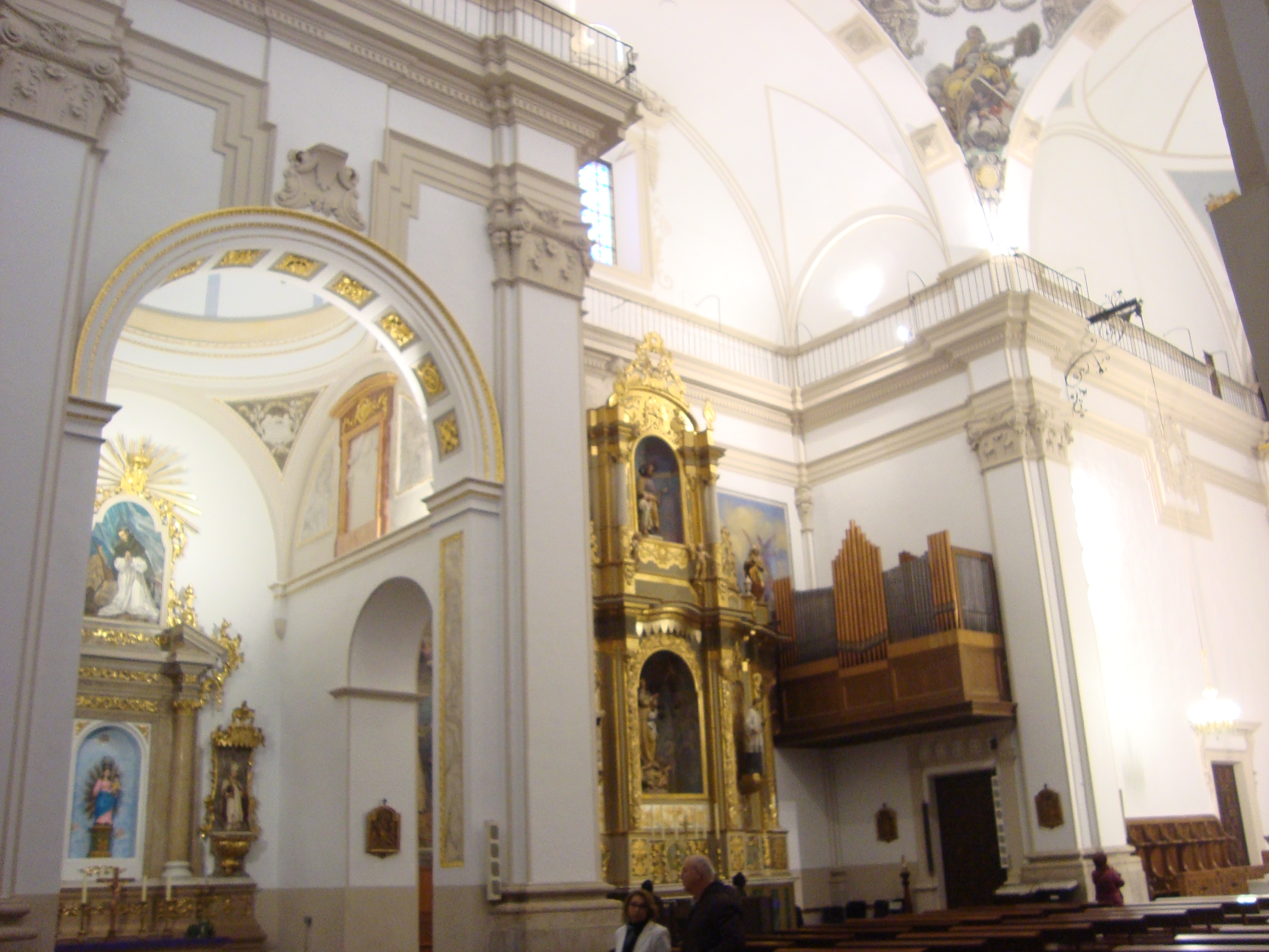 Capelles, esglèsia de Sant Bertomeú de Benicarló